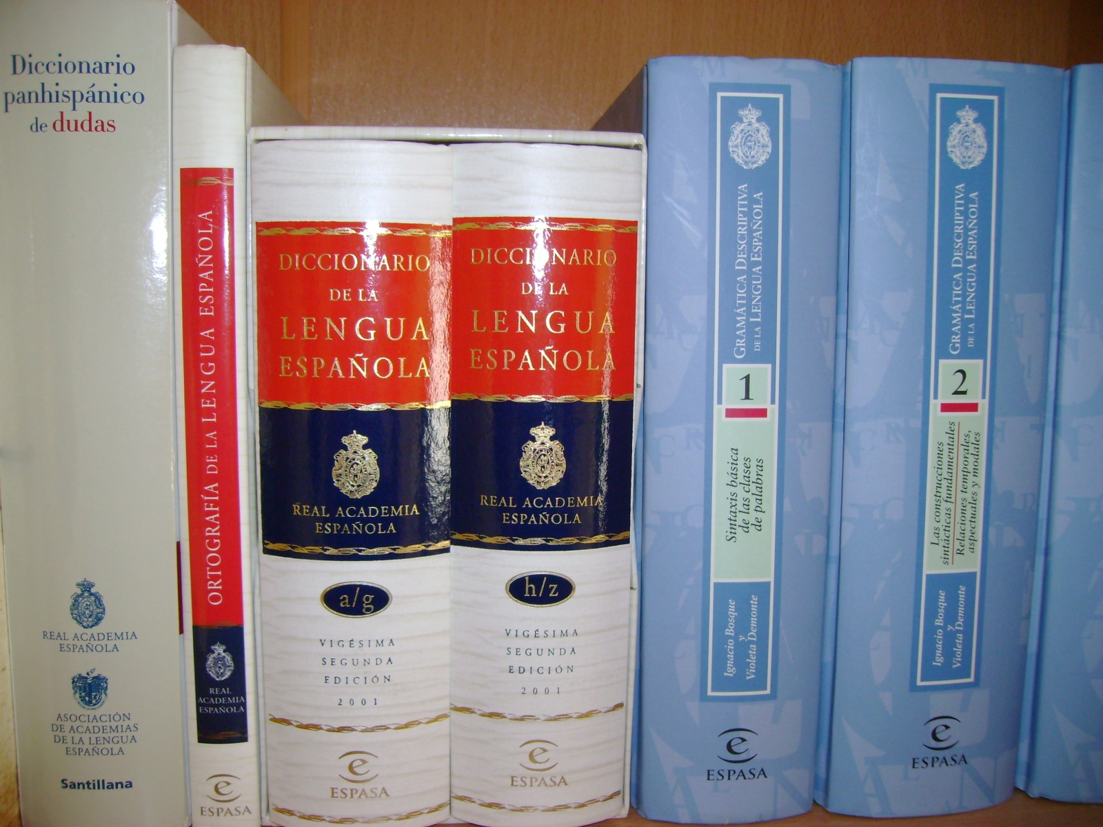 A Spanyol Királyi Akadémia főbb kiadványai